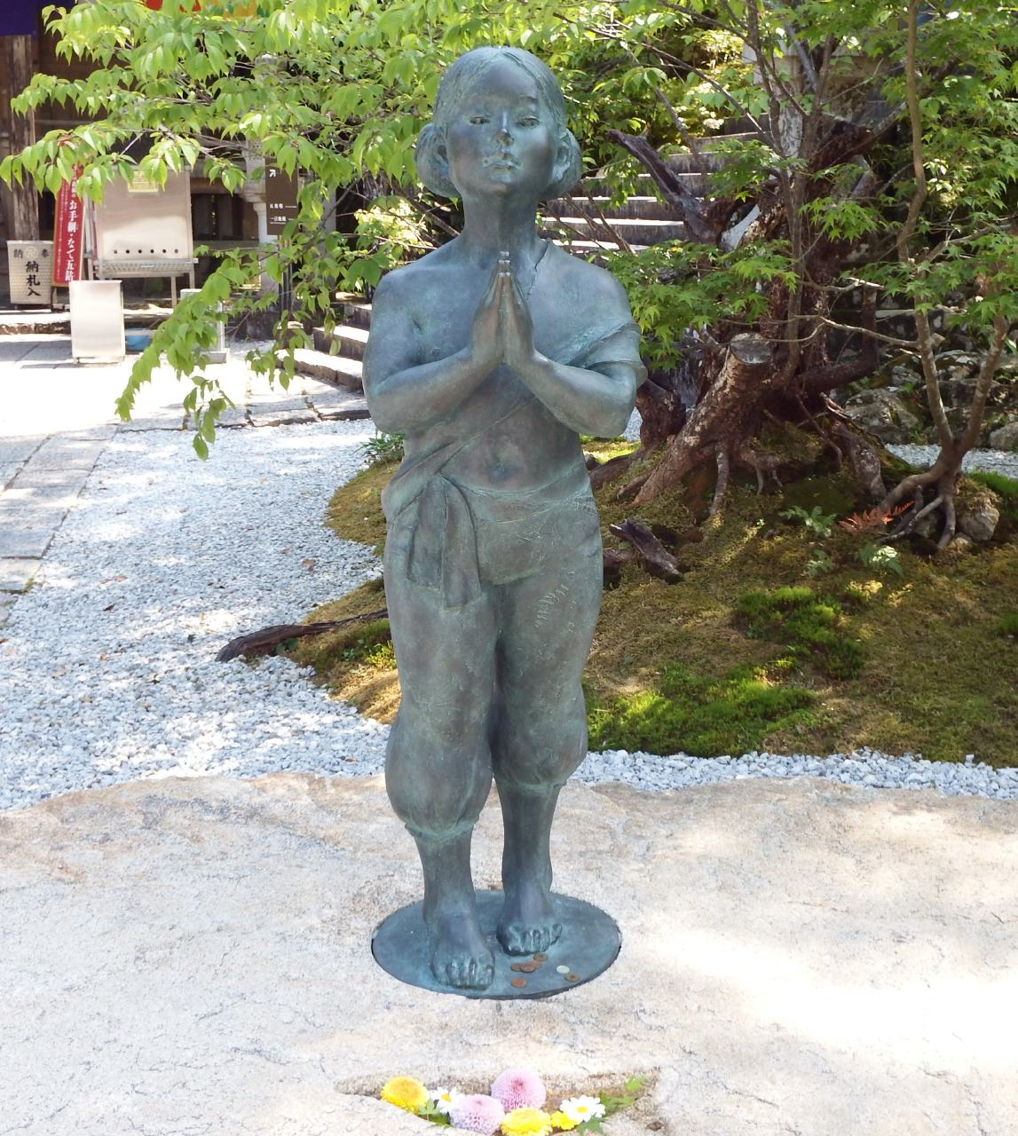 善財童子像（竹林寺）